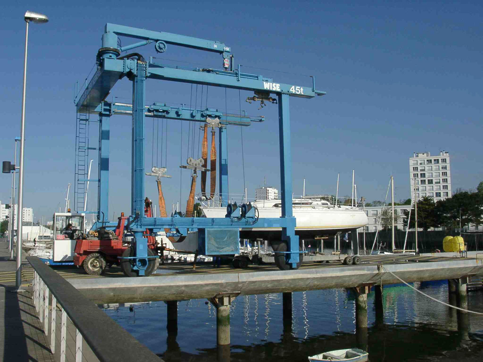 Description : Elévateur à bateaux au port de Lorient Lieu : Lorient, Bretagne, France Auteur : Pline Photo personnelle